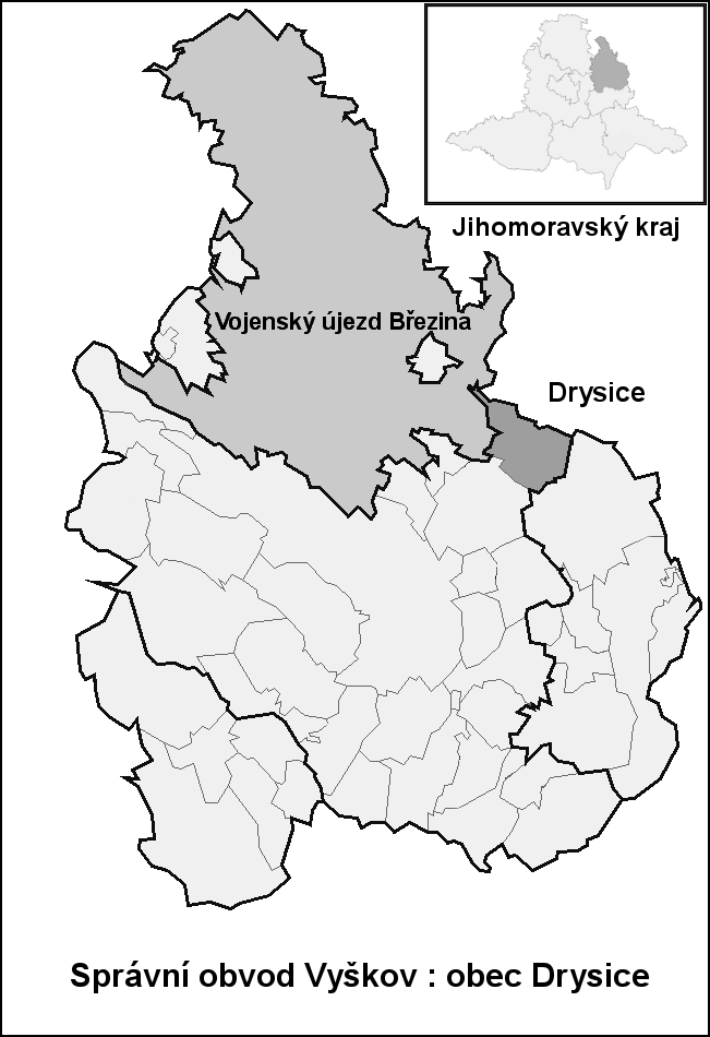 Hranice Drysice (Vyškov- czech republic)